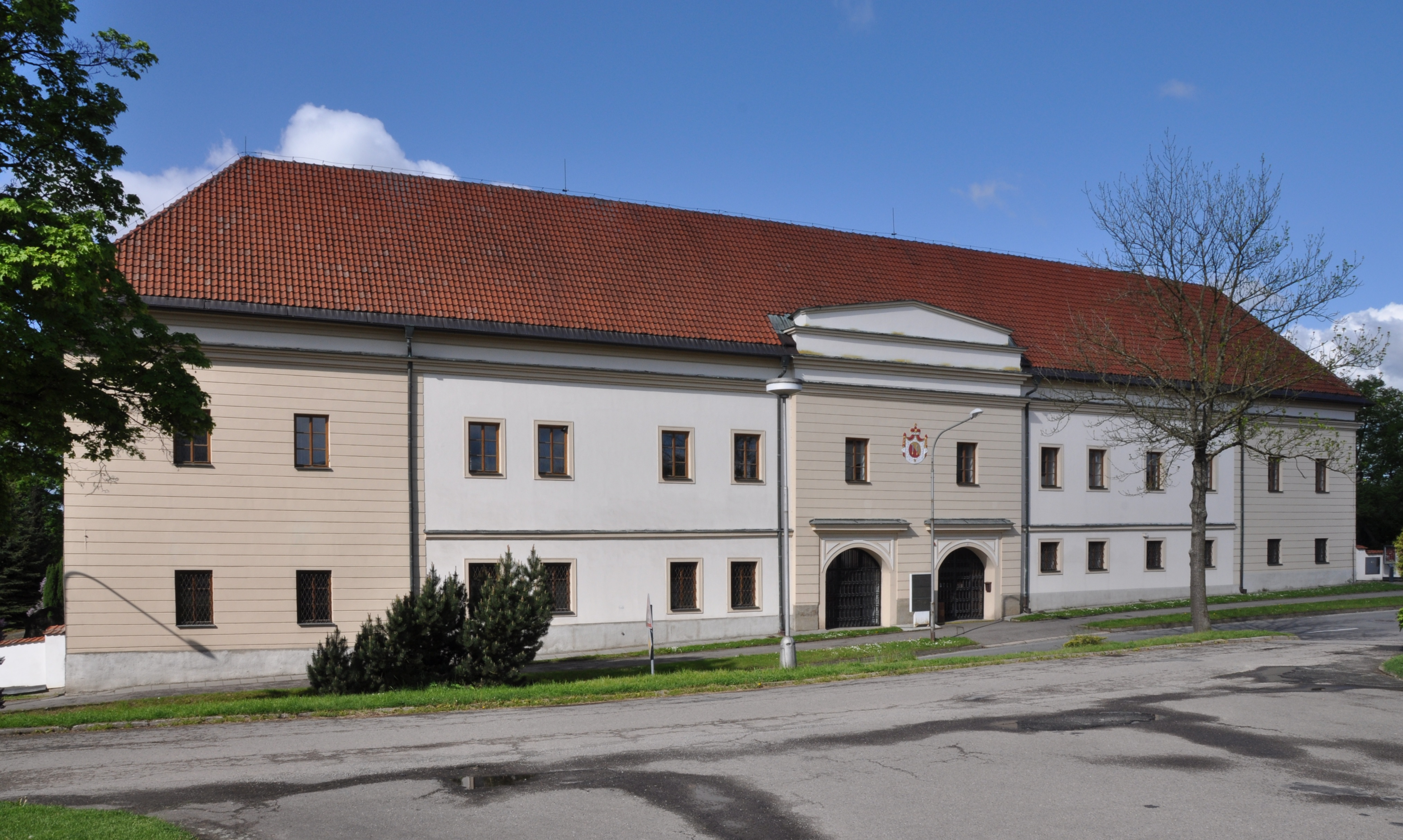 Přibyslav, zámek, pohled od východu.